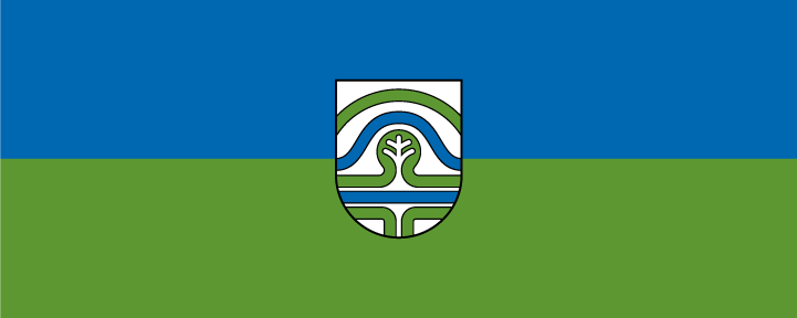 Zastava Občine Cerknica Avtor redesigna: Jan Petrič julij 2009